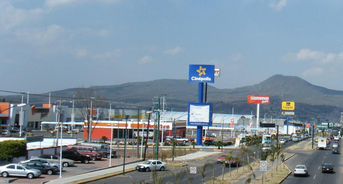 Galerías Metropolitana Uriangato vista desde el puente